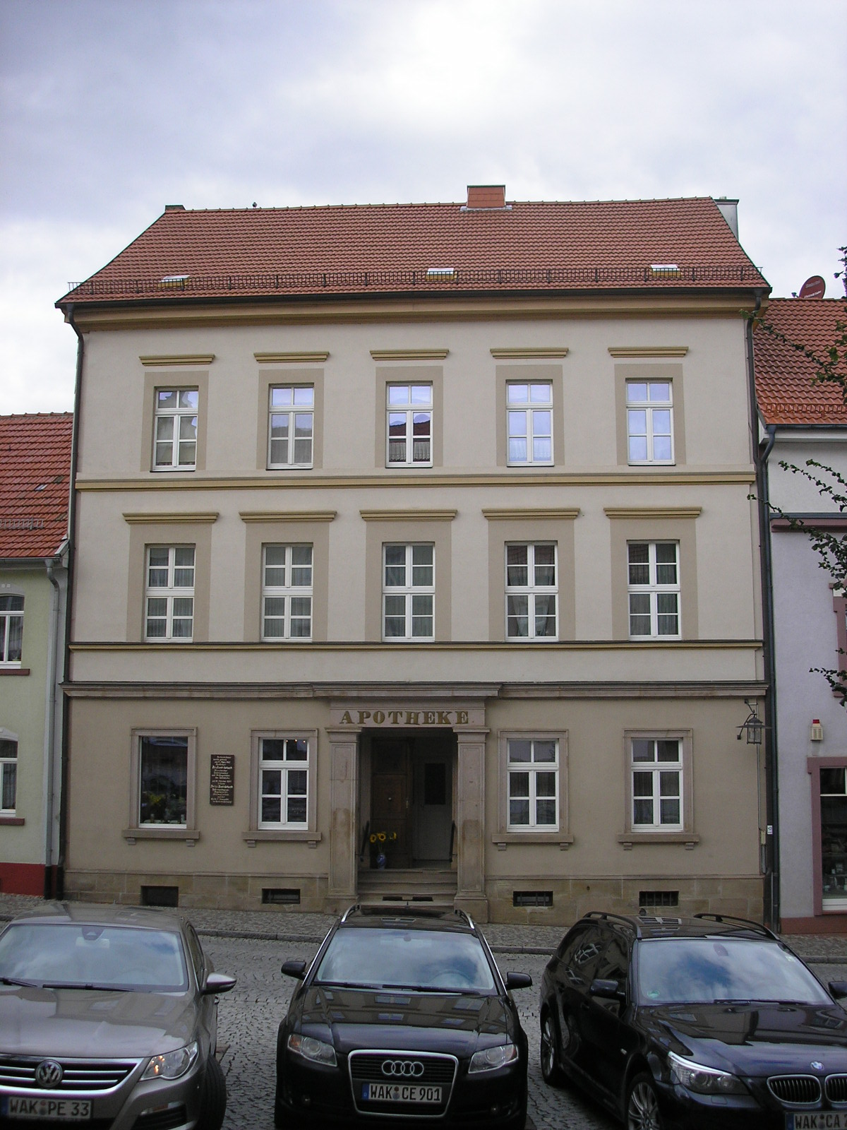 Die Apotheke in der Altstadt von Geisa (Thüringen).